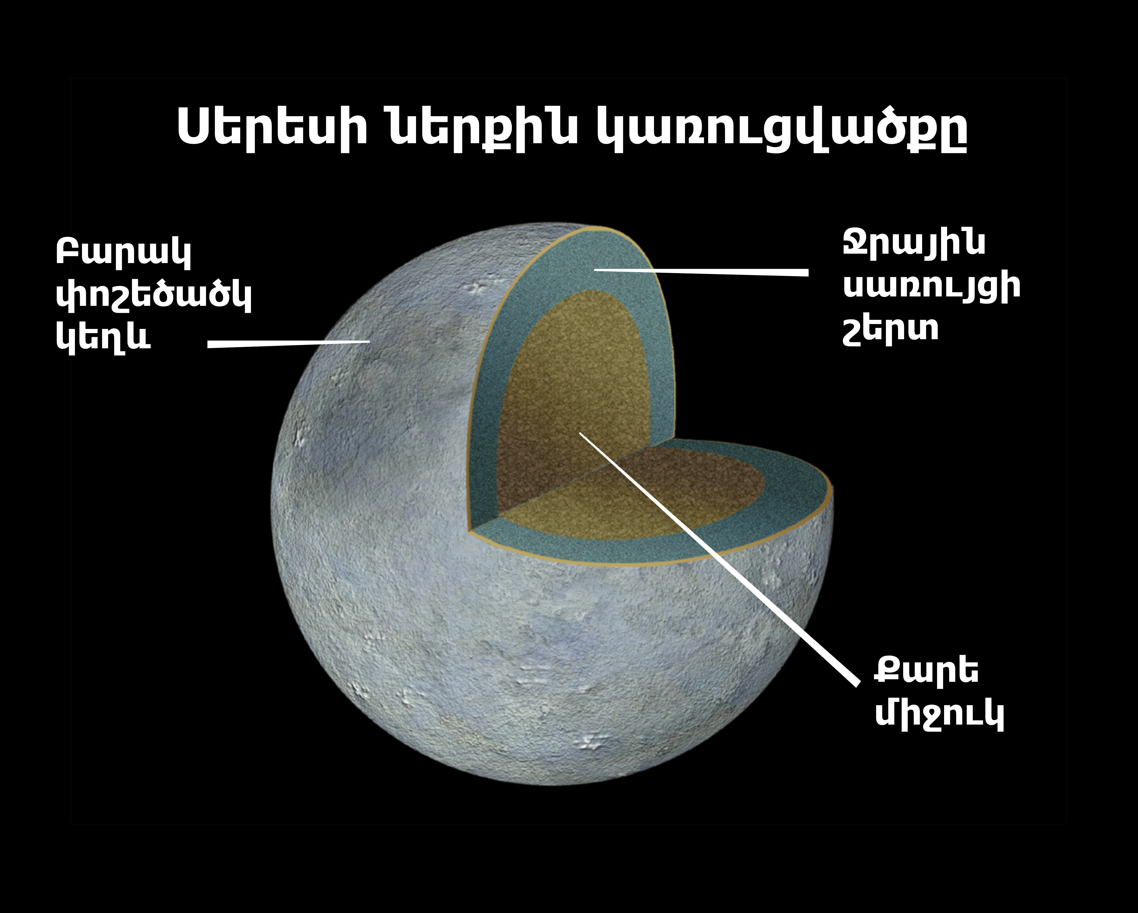 Սերեսի ներքին կառուցվածքը